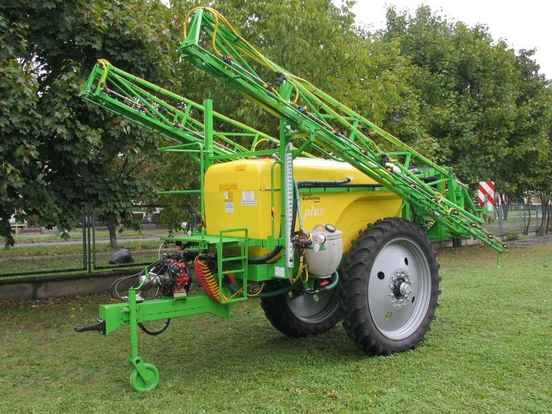 Pulverizadora de arrastre.